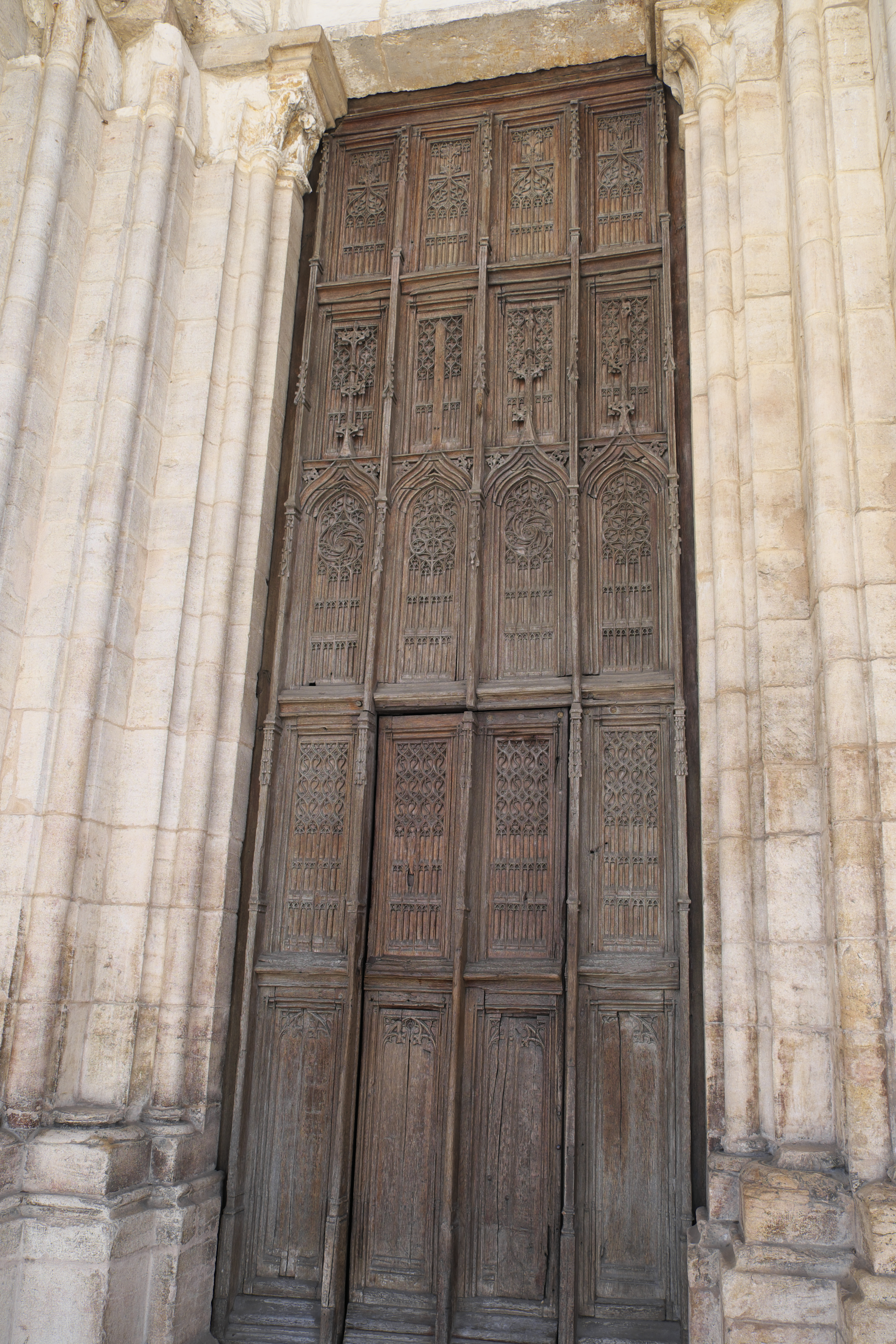 Katholische Pfarrkirche, ehemalige Stiftskirche, Notre-Dame in Beaune im Département Côte-d’Or (Bourgogne-Franche-Comté/Frankreich), holzgeschnitzte Türflügel